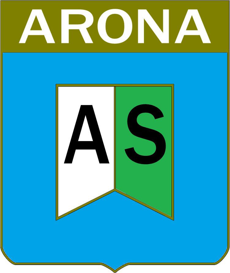 Logo AS ARONA